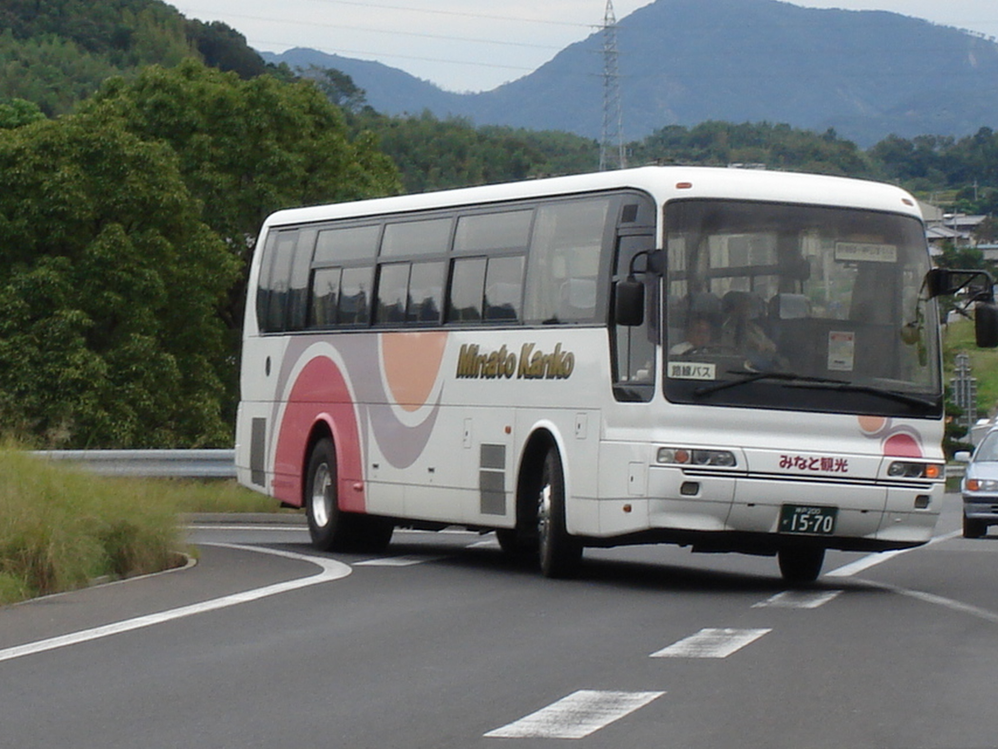 みなと観光バス（南あわじし）の淡路島特急線